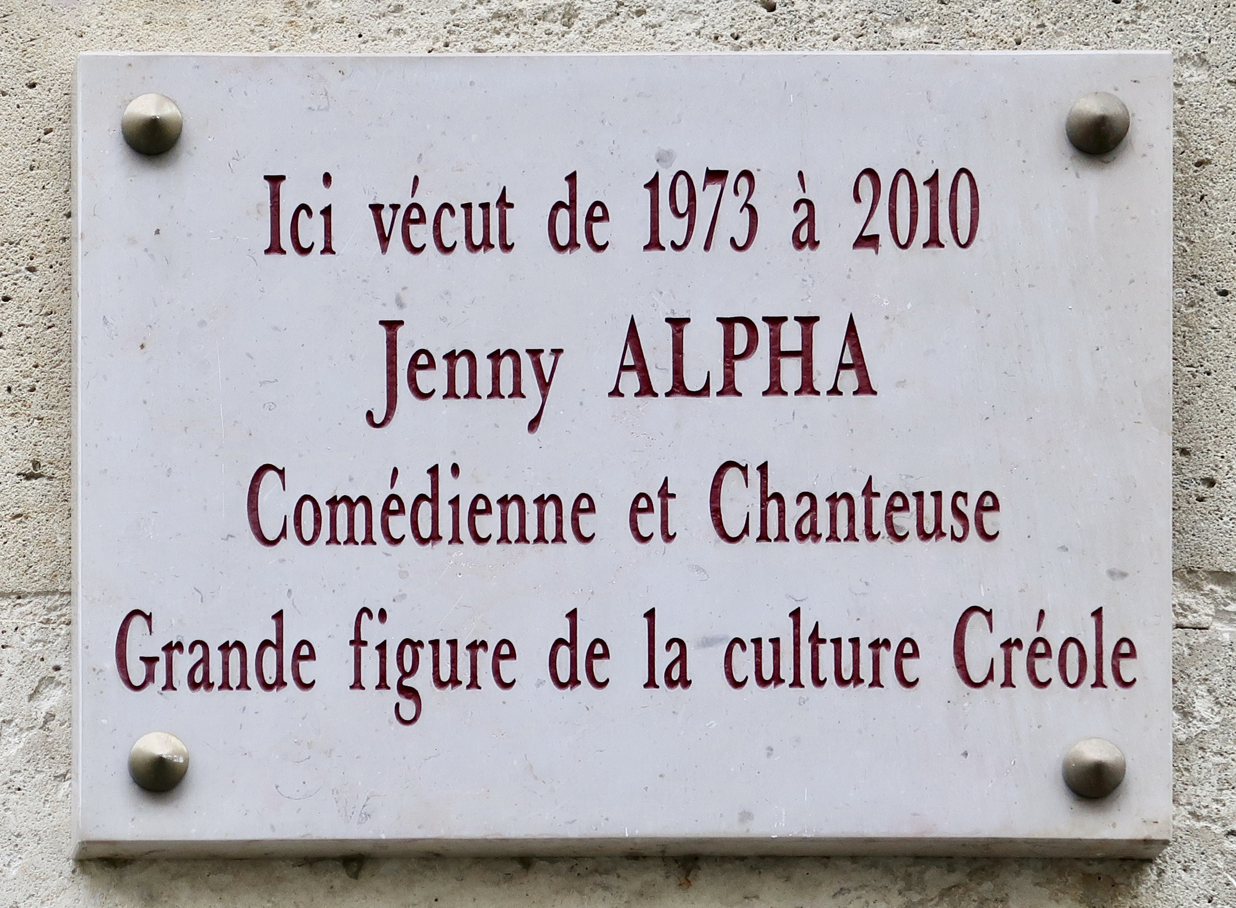 Plaque en mémoire de Jenny Alpha, 39 rue de l'Abbé Groult (Paris, 15e).